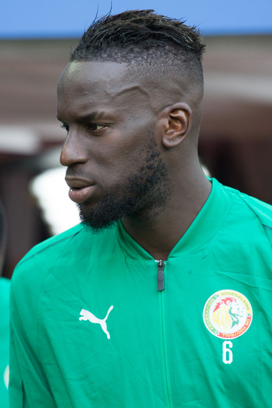 Польша неожиданно проиграла Сенегалу